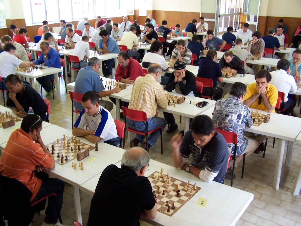 Un momento del torneo di San Giorgio su Legnano del 2005